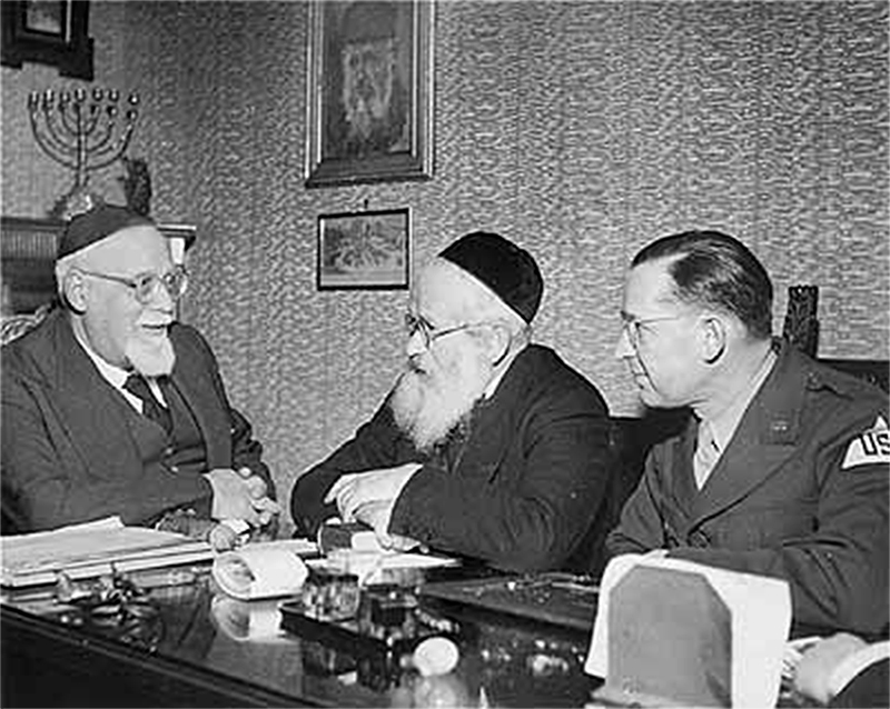 הרב דוד פראטו (משמאל), בדיון אודות מתן פתרון לבעיות יהודי אירופה ששרדו את השואה, יחד עם הרב יצחק הרצוג וארתור גרינלי, נציג המטה האירופי של הג'וינט האמריקאי, 1946 לערך.